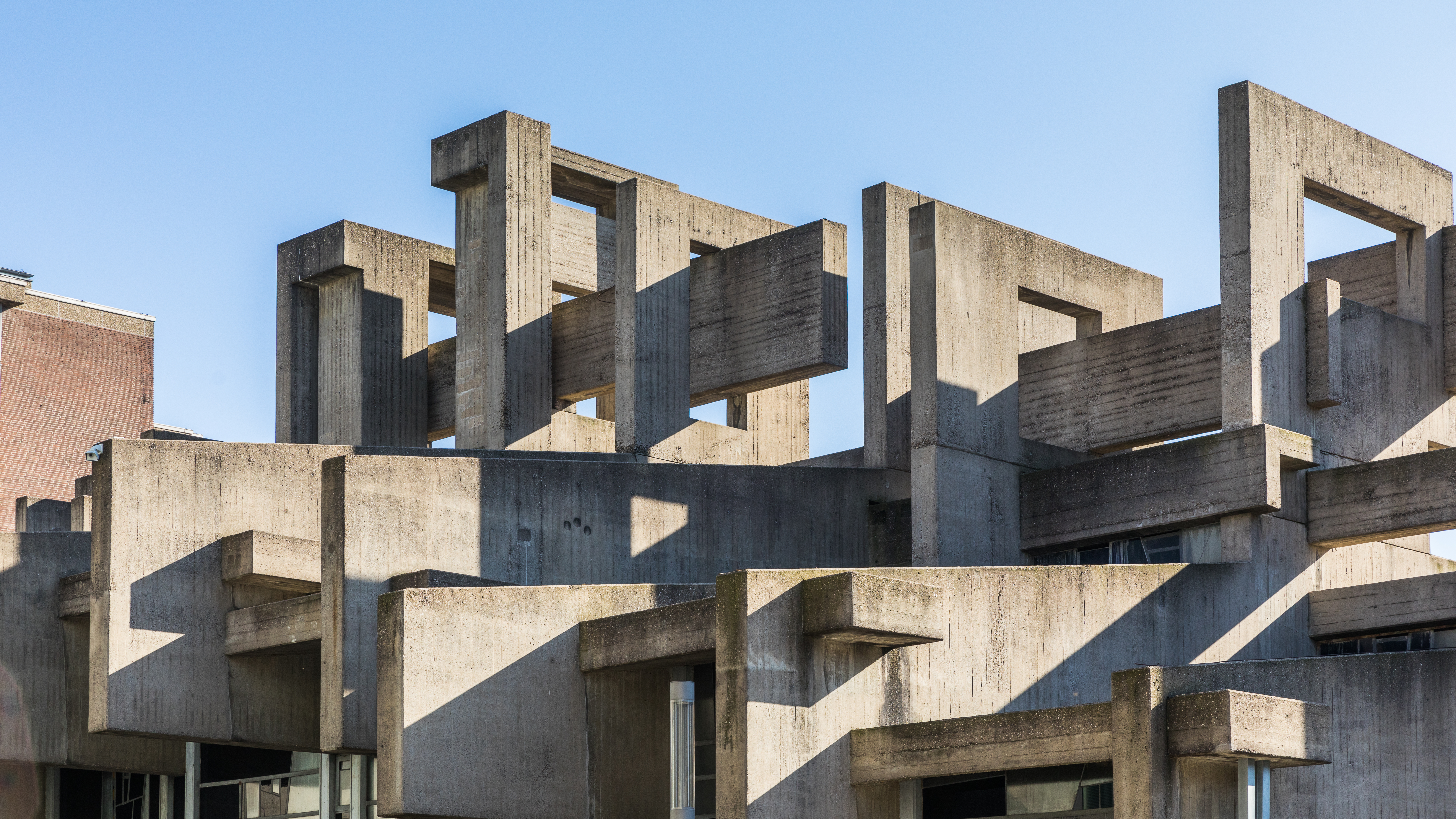 Kirche Johannes XXIII., Katholische Hochschulgemeinde Köln